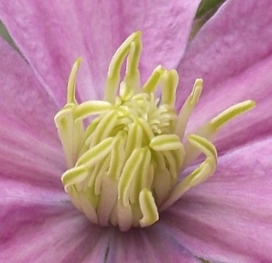 Stigmate de 'Contesse de Bouchaud'